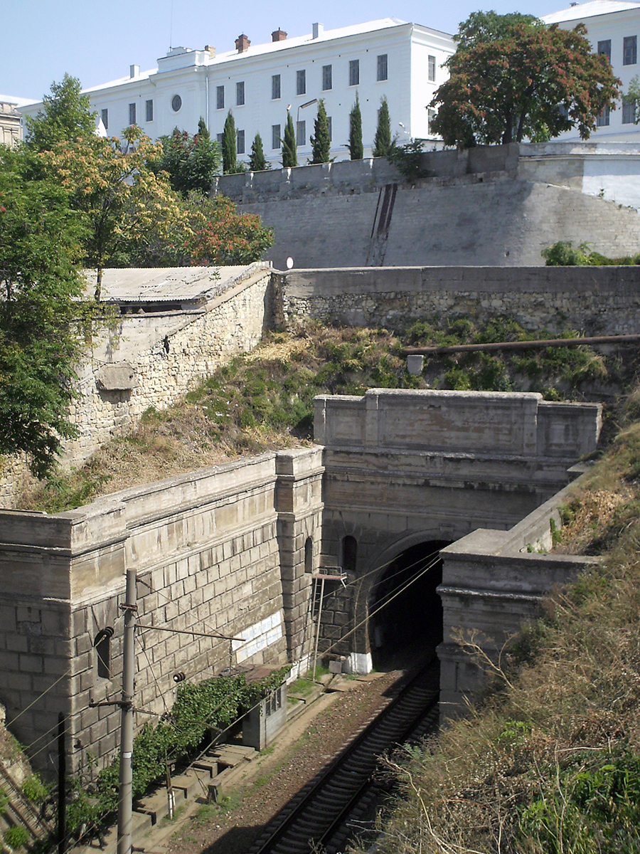 выезд Городского туннеля